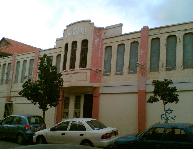 he:קולנוע עדן